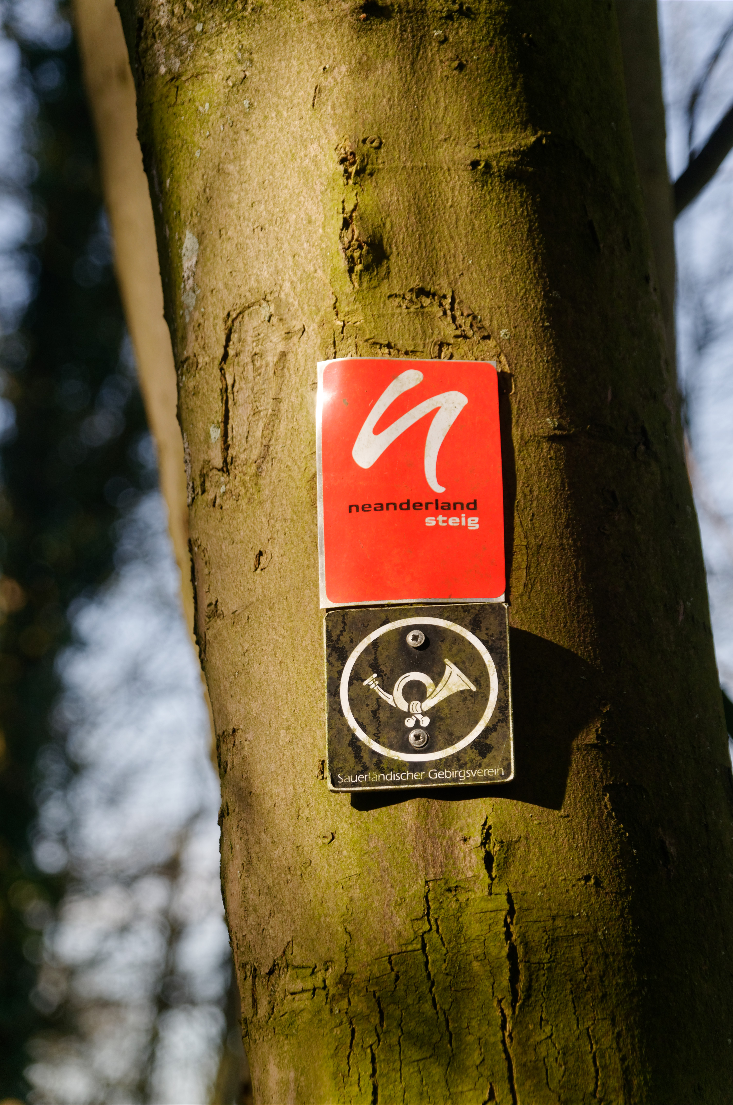 Beschilderung von Neanderlandsteig und Posthorweg